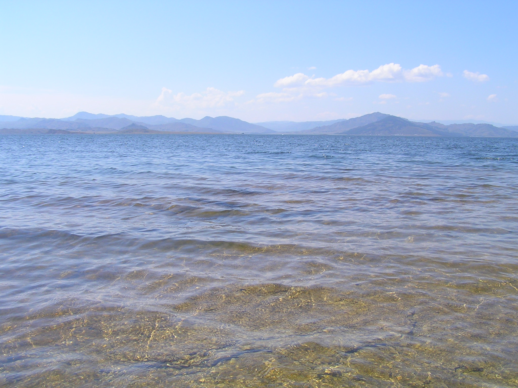 Бухтарминское водохранилище, Восточно-Казахстанская область, Казахстан